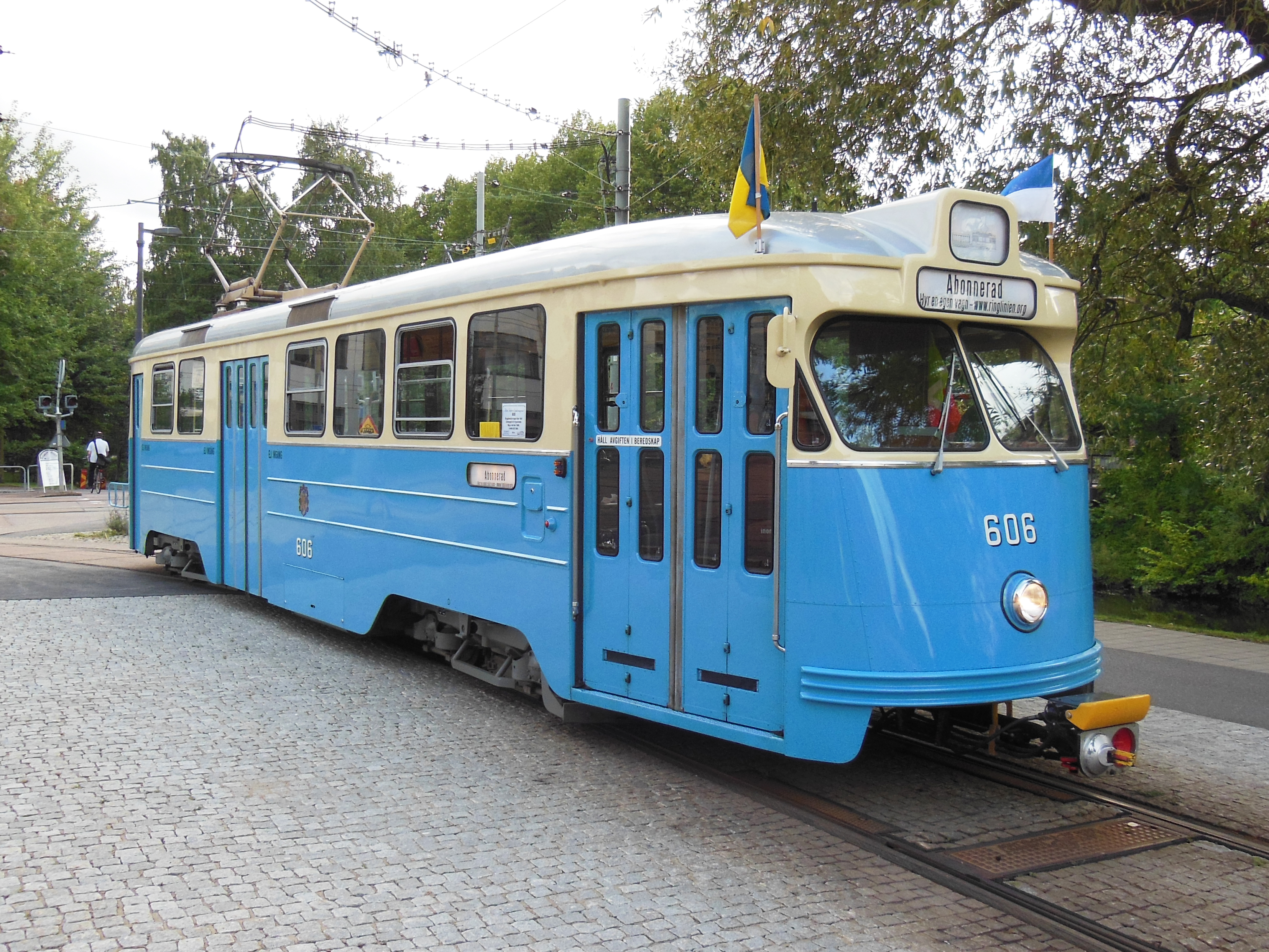 M25-spårvagn nummer 606 parkerad på Åvägen, i Göteborg.